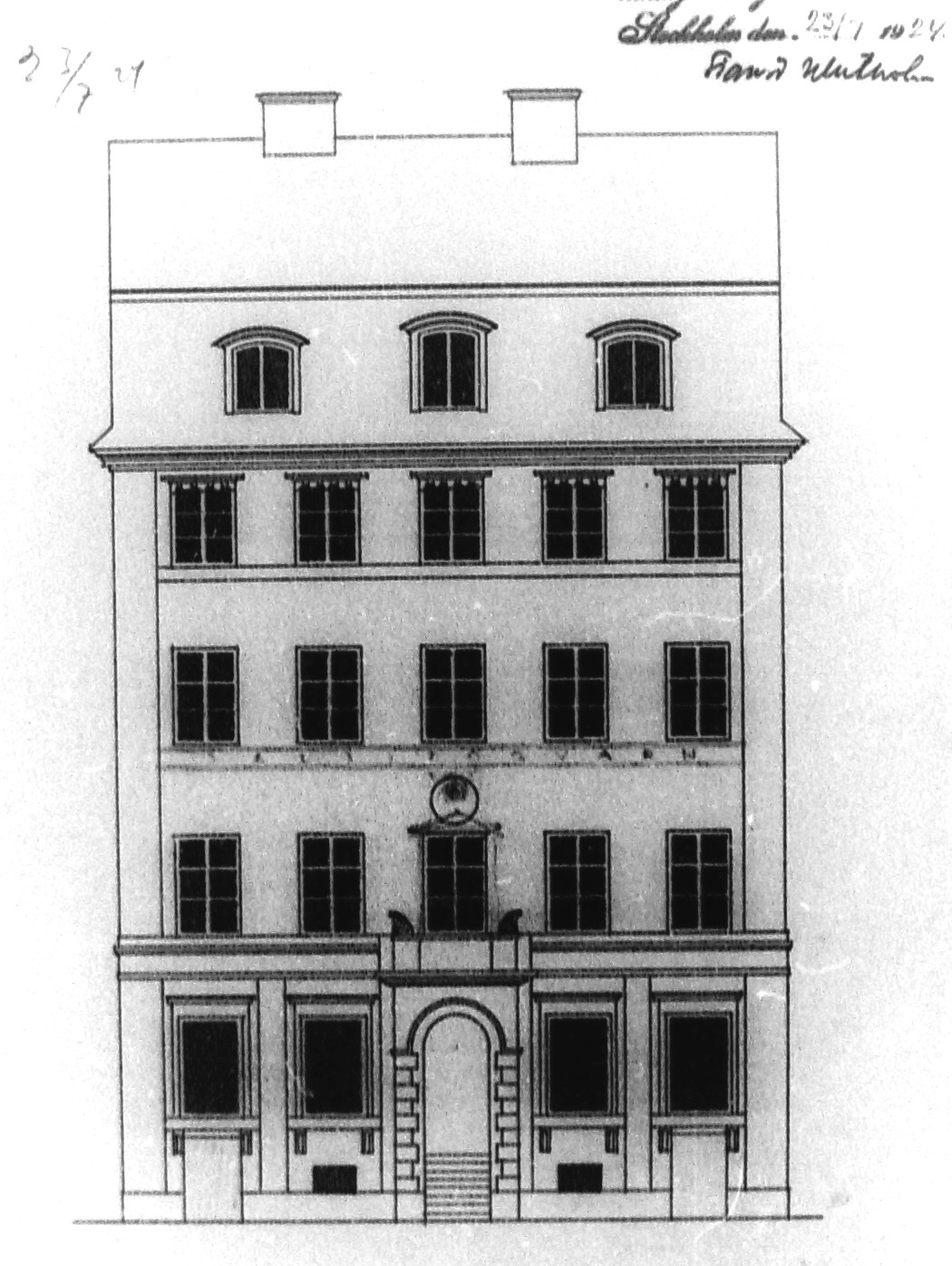 Hobelinska huset, Skeppsbron, Stockholm, fasadritning